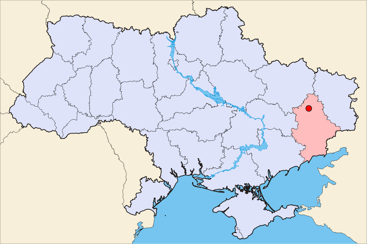 Based on Image:Donezk-Ukraine-Map.png by User:Skluesener.